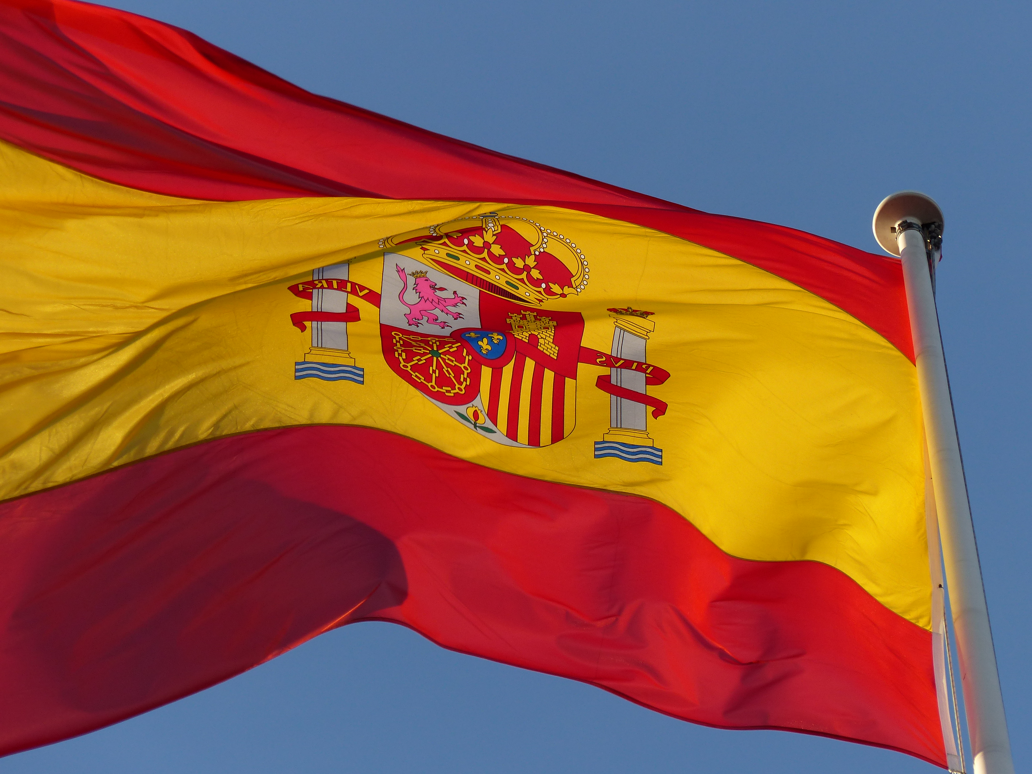 Bandera de España sobre el IEEE